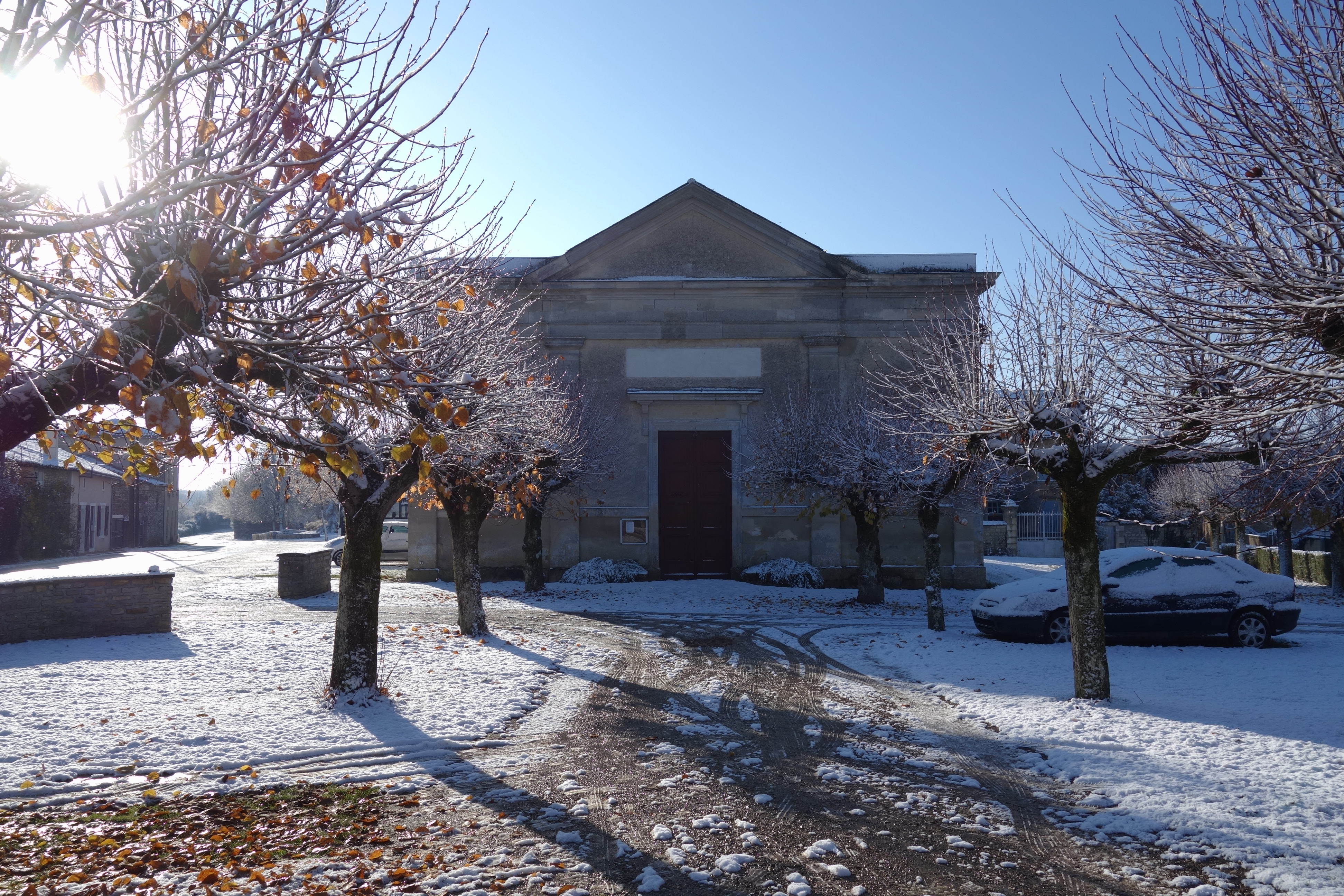 Le Temple sous la neige